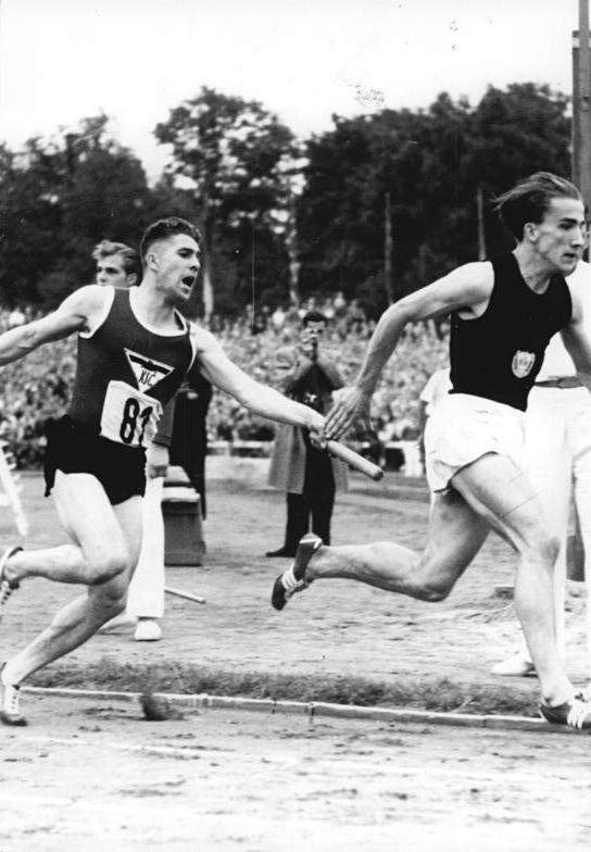 Zentralbild Wen-Wlo. Deutsche 4 x 100m Staffel lief Weltrekord. Im Rahmen des Rudolf-Harbig-Gedenksportfestes am Sonnabend und Sonntag, dem 29. und 30.9.1956, in Dresden gab es die herausragende Leistung im 4 x 100m Staffellauf der Damen. In der Besetzung Erika Fisch (Bundesrepublik), Christa Stubnick, Gisela Köhler und Bärbel Mayer (alle DDR) wurde mit 45,1 Sek. ein neuer Weltrekord aufgestellt und die alte Bestleistung der sowjetischen Staffel um eine Zehntel Sekunde verbessert. UBz: Stabwechsel der gesamtdeutschen 4 x 100-m-Staffel der Herren. Der Karlsruher Heinz Fütterer (links) übergibt an den Hallenser Manfred Steinbach.